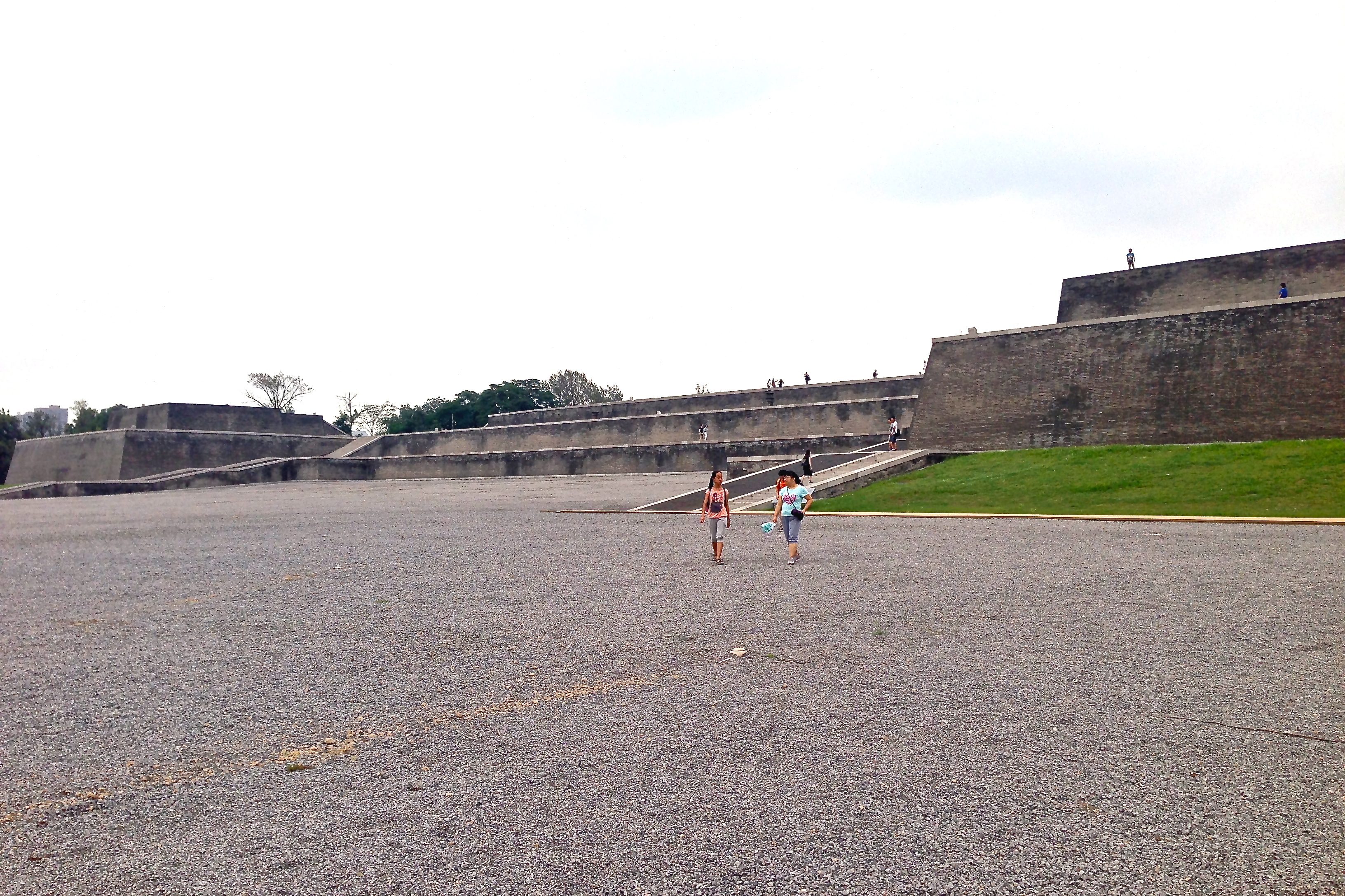 Fundamentet till Hanyuansalen i Damingpalatset från Tangdynastin